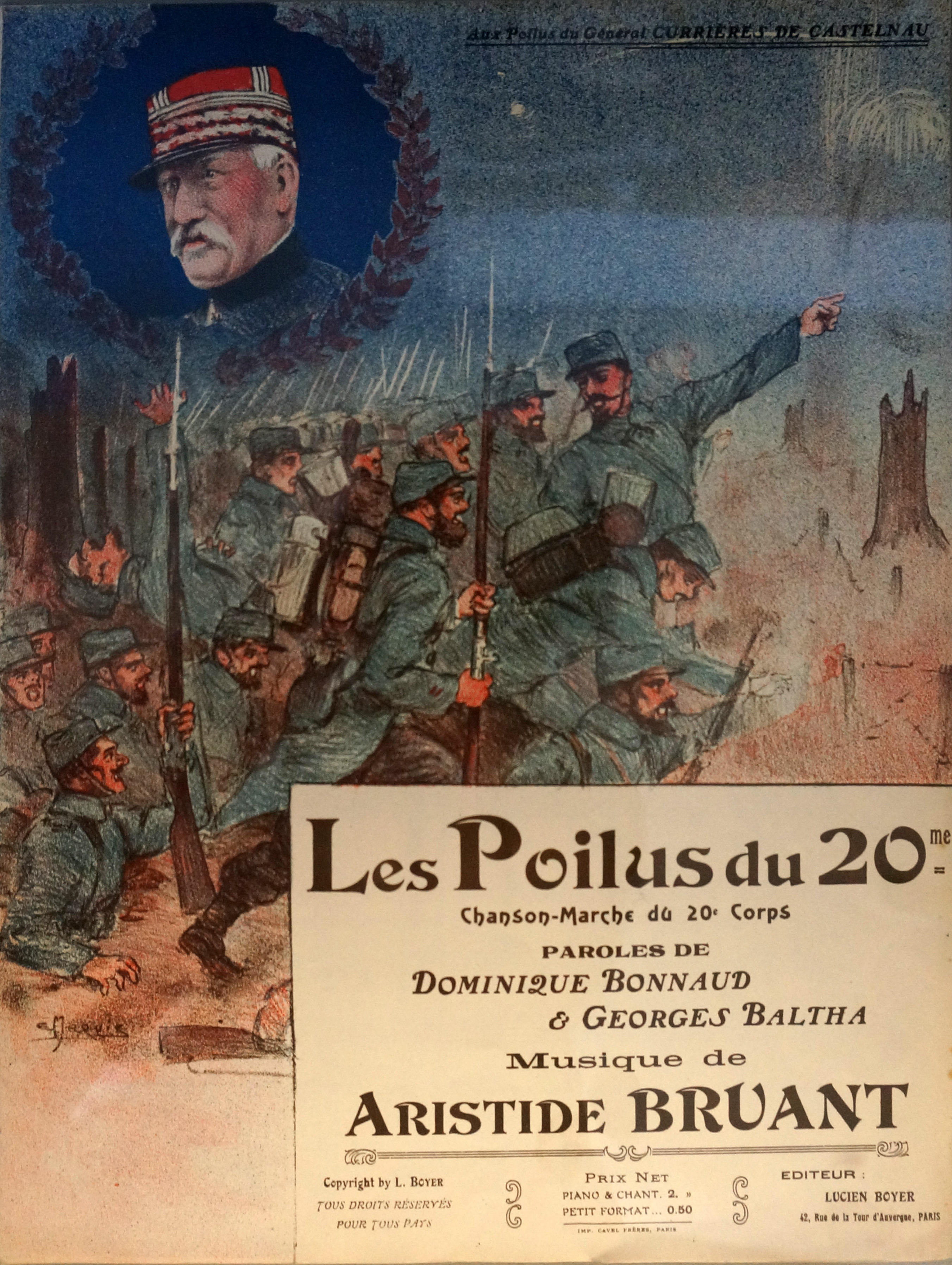 Lors de l'exposition temporaire été 1914 Nancy et la Lorraine dans la guerre au Musée Lorrain.